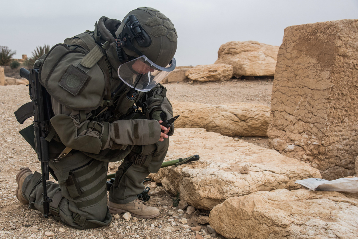 Использование военными инженерами МПЦ ВС РФ новейших инженерных средств при разминировании Пальмиры.